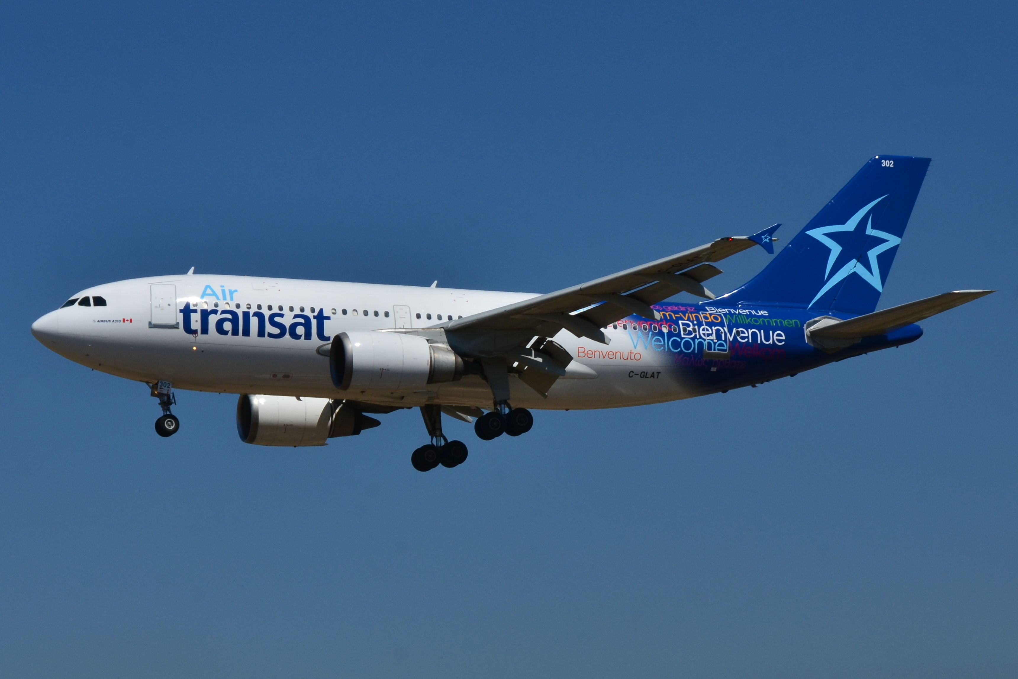 Photo prise à l'aéroport de Barcelone-El Prat (LEBL) en Espagne. Picture take at Barcelona-El Prat Airport (LEBL) in Spain.